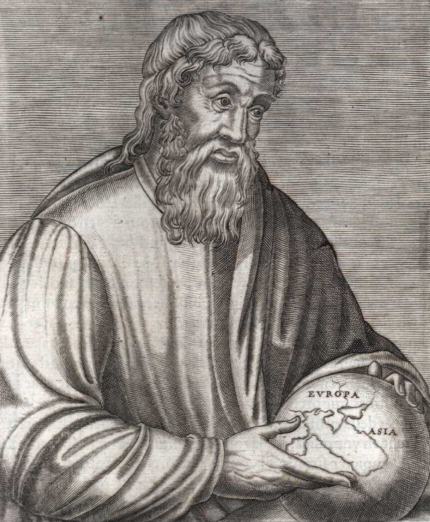 Strabon